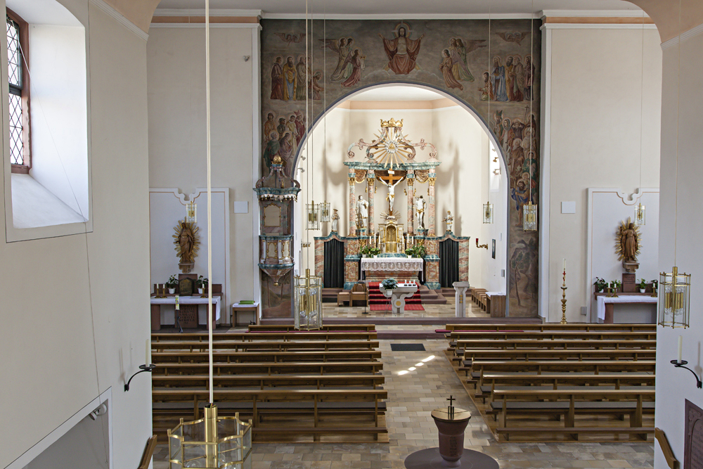 Innenraum der St. Laurentius-Kirche in Alzenau-Michelbach